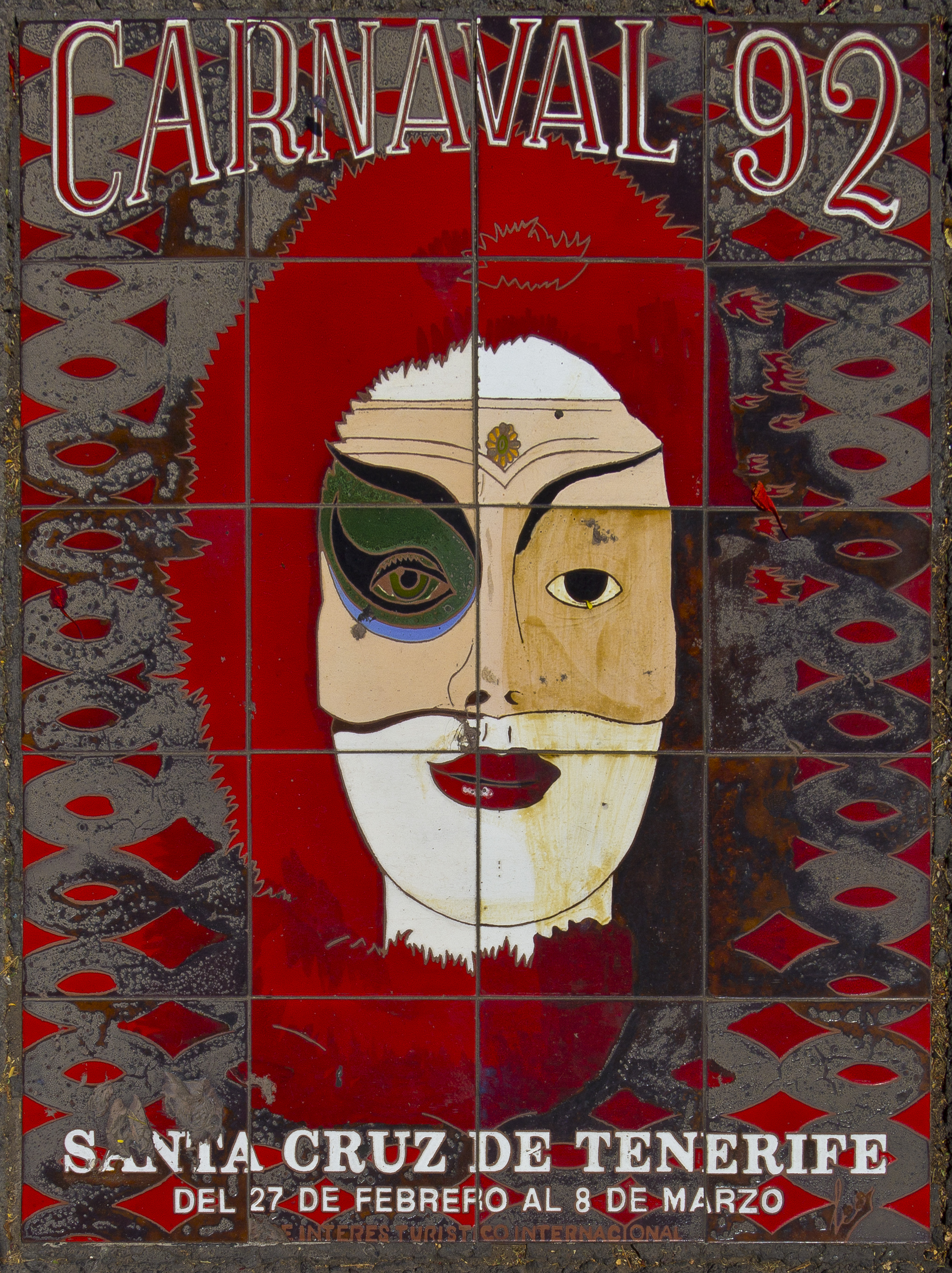 Im Dezember 1996 wurde in Santa Cruz de Tenerife eine Promenade zu Ehren der Gestalter der Karnevalsplakate eröffnet. Dort ist eine große Anzahl der Plakate als „Azulejo“ im Boden eingelassen dargestellt.